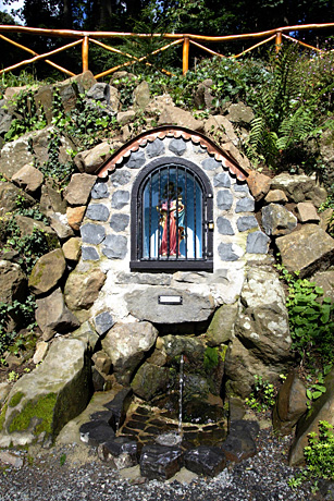 Marienquelle - ältester Teil Bad Marienbergs